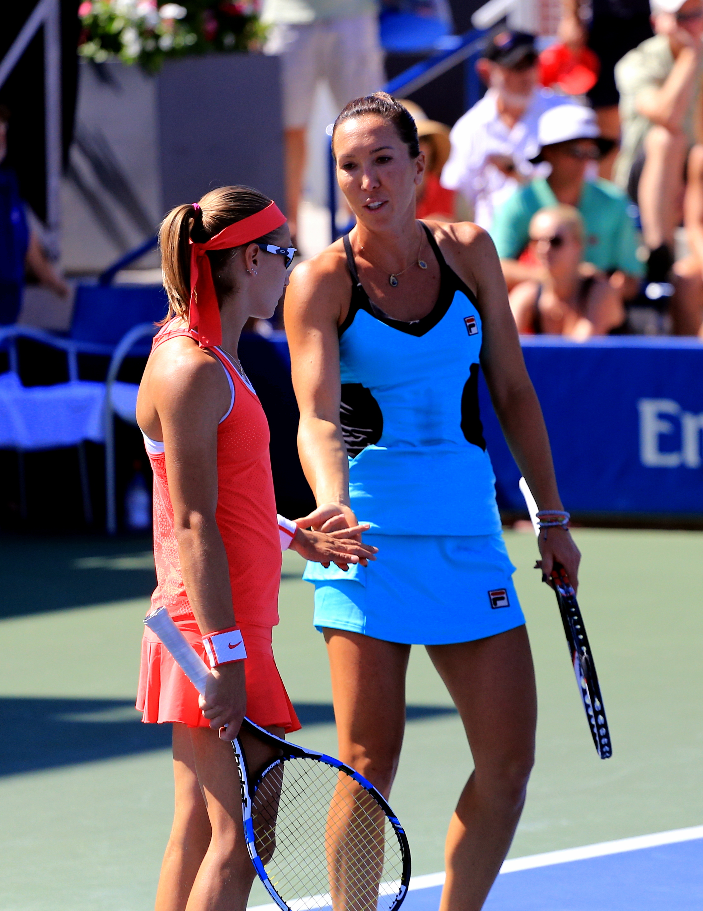 Aleksandra Krunić and Jelena Janković at the 2015 US Open